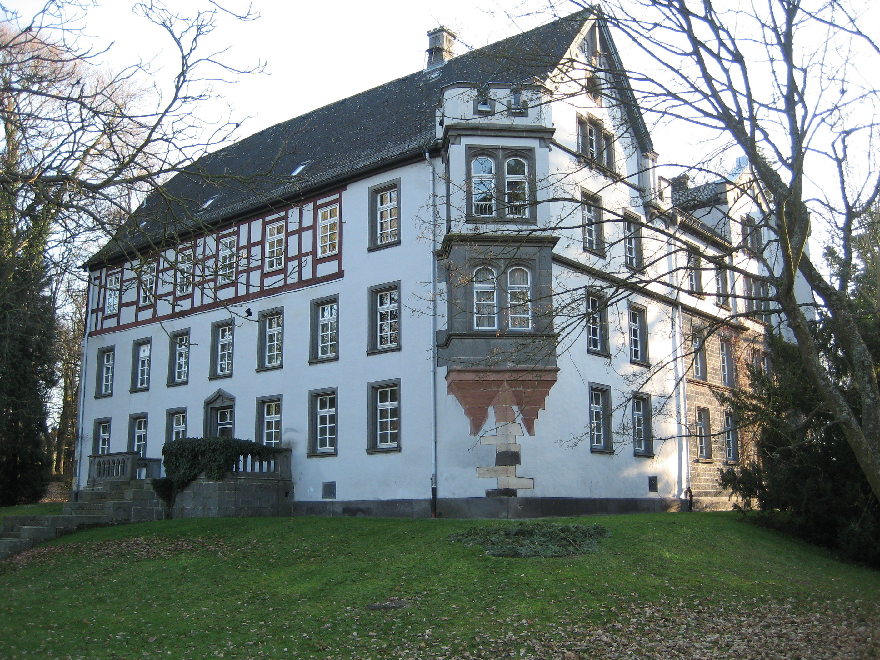 Busecker Schloß. Freiin Ernestine von Nordeck zur Rabenau geb. von Zwierlein, die 1829 Freiherr Friedrich von Nordeck zur Rabenau heiratete, ließ1860 das Schlossgebäude im jetzigen neugotischen Stil erbauen und ersuchte auch das Großherzogtum Hessen um unentgeltliche Verwandlung ihres Lehens zu Großen-Buseck in freies Eigentum. Die Gemeinde erwarb 1976 das Schloss nebst Park und Gutshof. Zwei Jahre später fiel (nach Bildung der Gemeinde Buseck durch die Gebietsreform in Hessen am 1. Januar 1977) der Beschluss zum Erhalt von Schloss und Park und nach umfangreichen Restaurierungsarbeiten konnte 1981 die Gemeindeverwaltung einziehen.